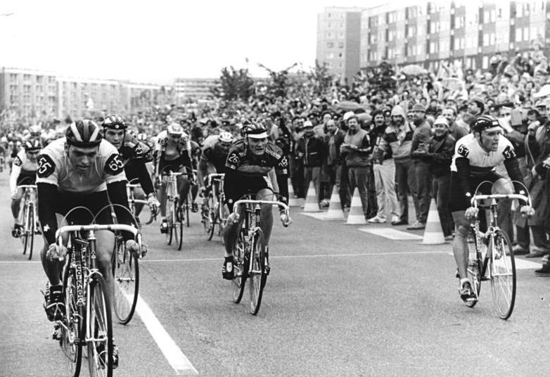 Gera, Friedensfahrt, Fahrerfeld, Zuschauer ADN-ZB Kasper 12.5.87-kb Gera: 40. Internationale Friedensfahrt-4. Etappe Rund in Gera über 56 km-Der Geraer Olaf Ludwig (l.) siegte in seiner Heimatstadt im Sprint vor Uwe Raab (verdeckt) und dem über lange Zeit allein führenden Weltmeister Uwe Ample (r.). Am Ende dieser Etappe standen drei DDR-Fahrer auf derm Siegerpodium. M.: Jean Francois Lafille (Nr. 255 Frankreich).